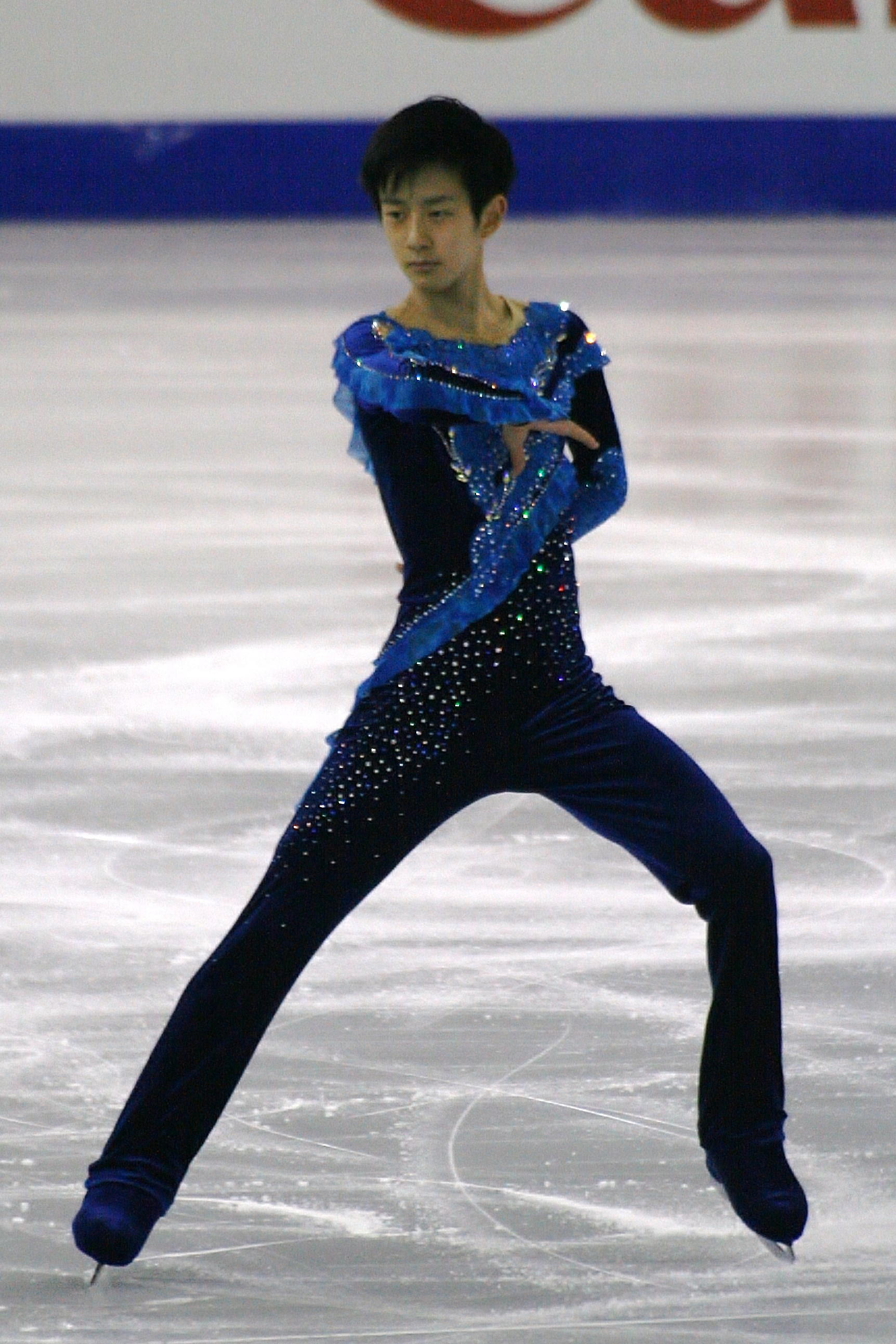 Сота Ямамото (Япония) на финале Гран-при среди юниоров 2014-2015.